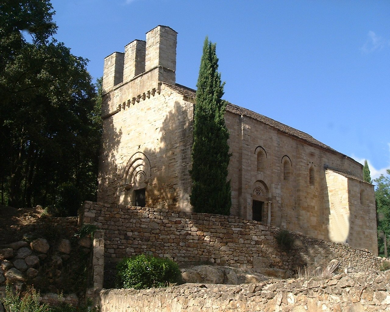 Prieuré Saint-Pierre-de-Rhèdes (Lamalou-les-Bains